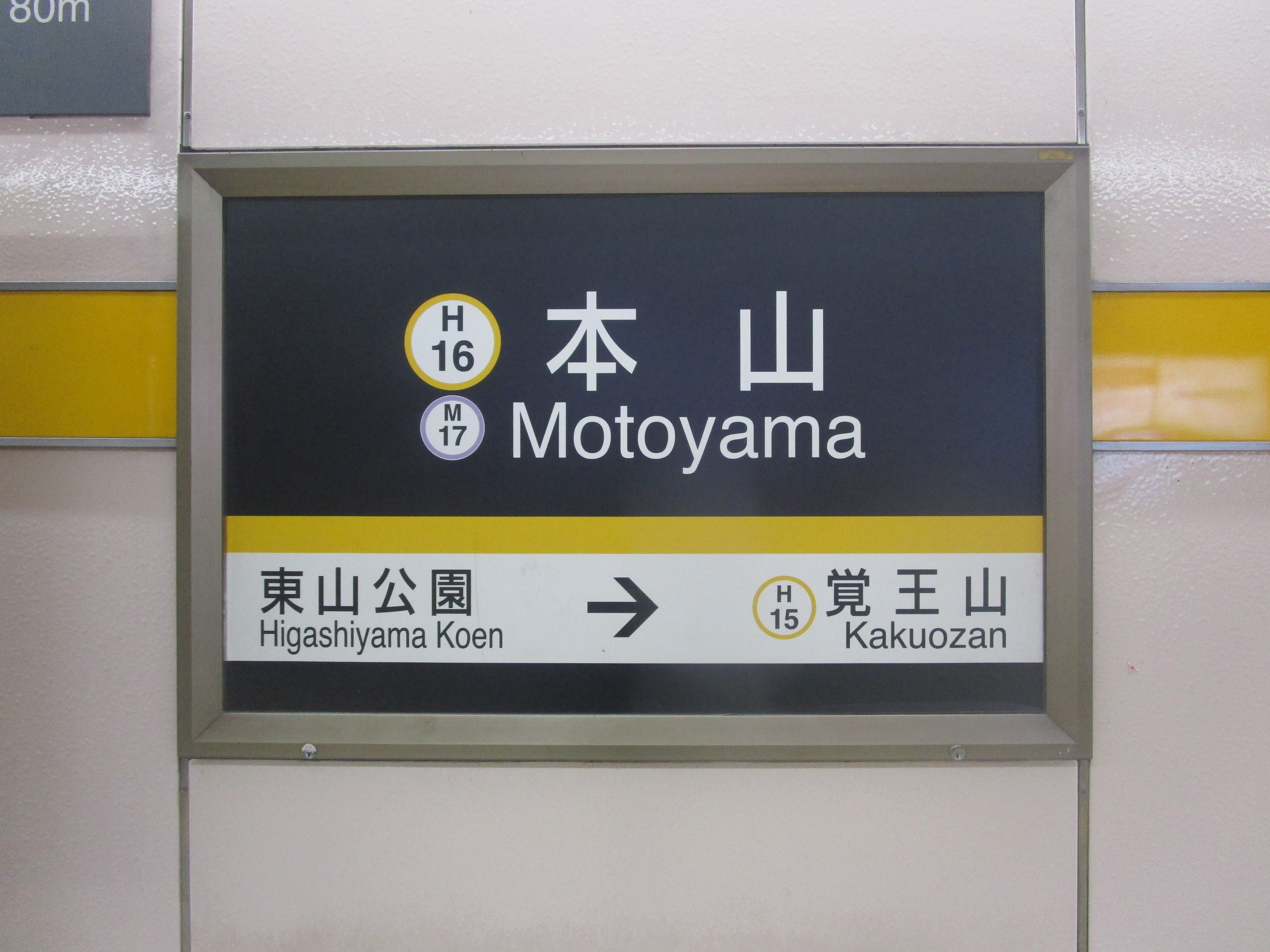 東山線本山駅の駅名標